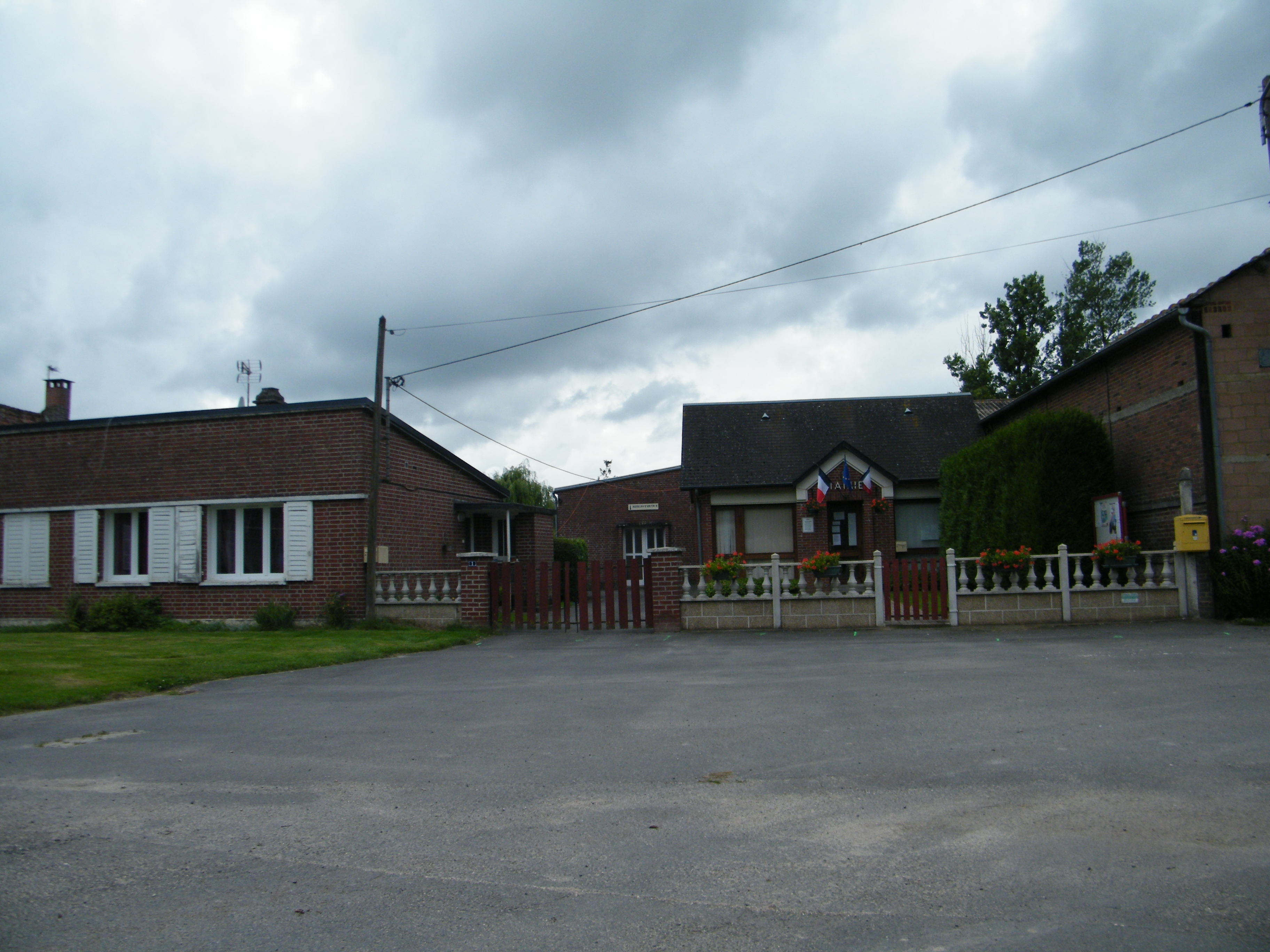 Mairie.